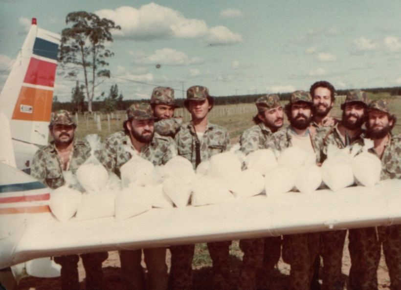 Operação efetuada na Cidade de Cerqueira Cesar, interior de São Paulo onde foram apreendidos 50kg de Cocaína.Apreensão recorde na época.Policiais da Delegacia de Repressão às Drogas da Polícia Federal do Estado de São Paulo- DRE